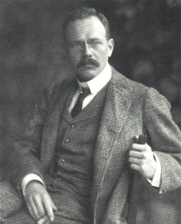 Porträt von Carl Friedrich von Siemens.